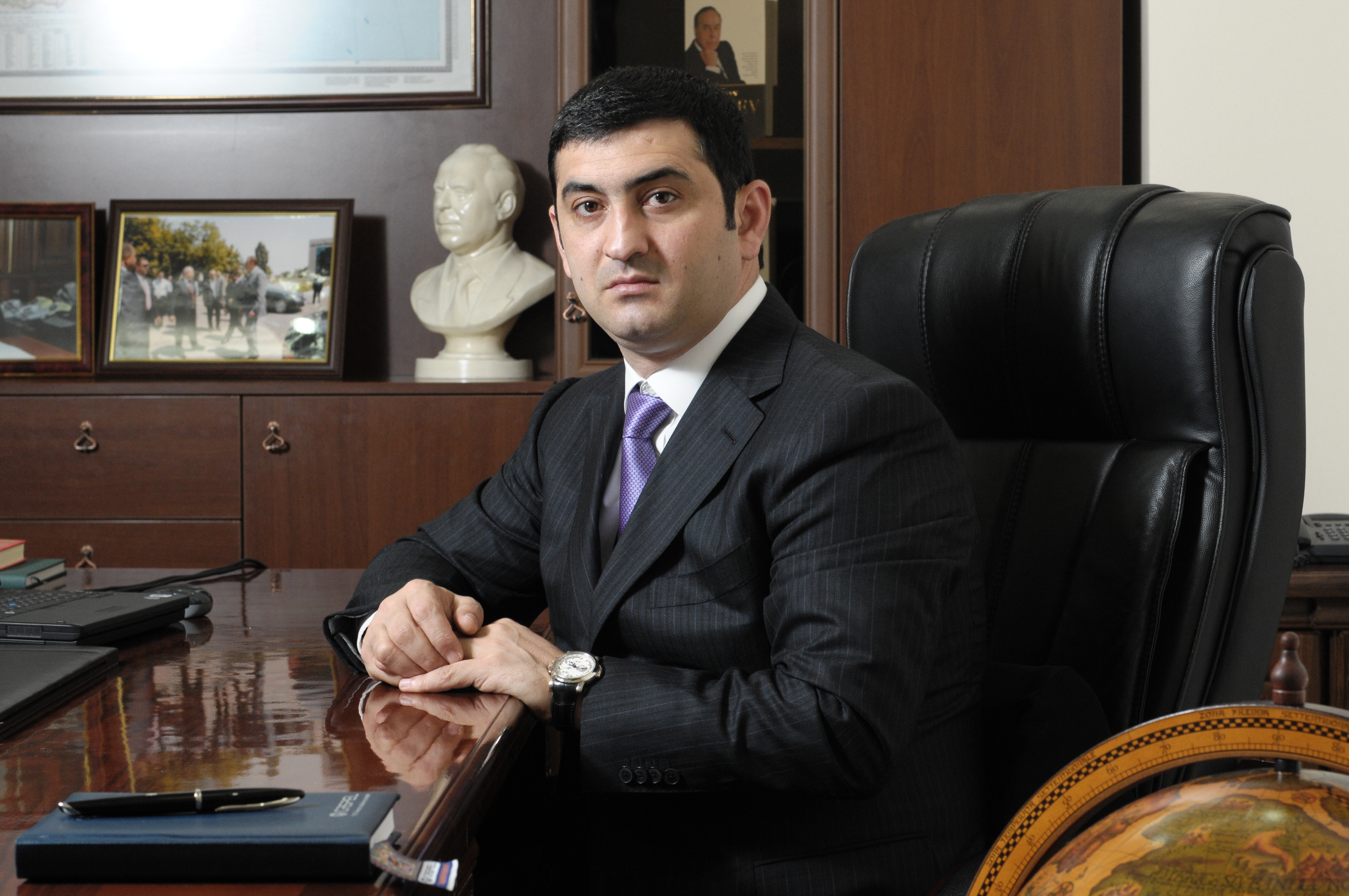 Мамедов Намиг Масим оглы